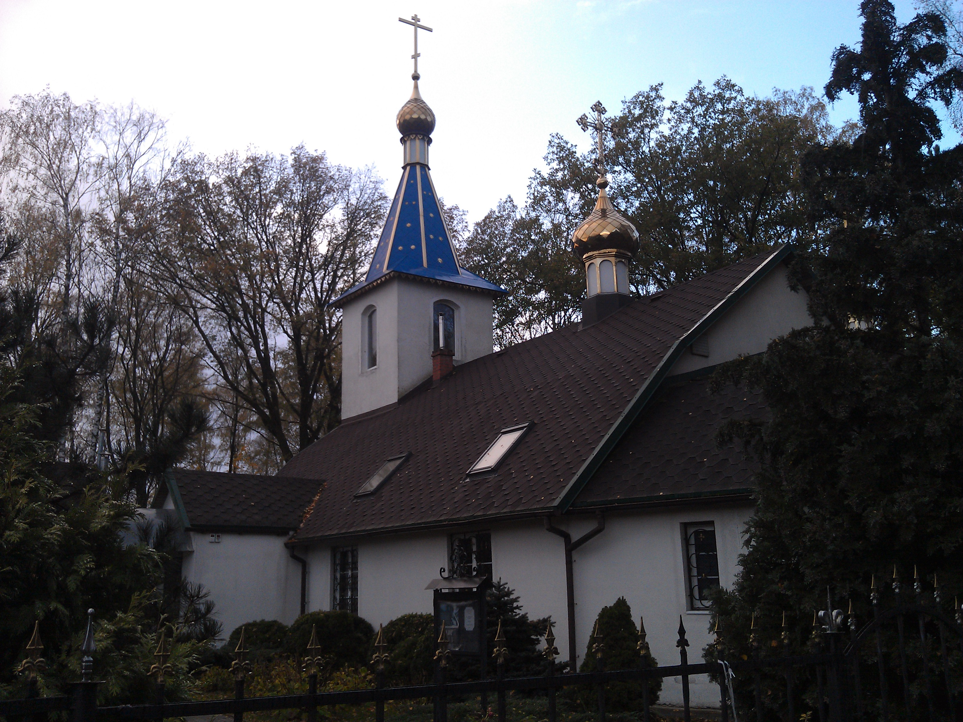 Пейзаж в посёлке Взморье с храмом и природой